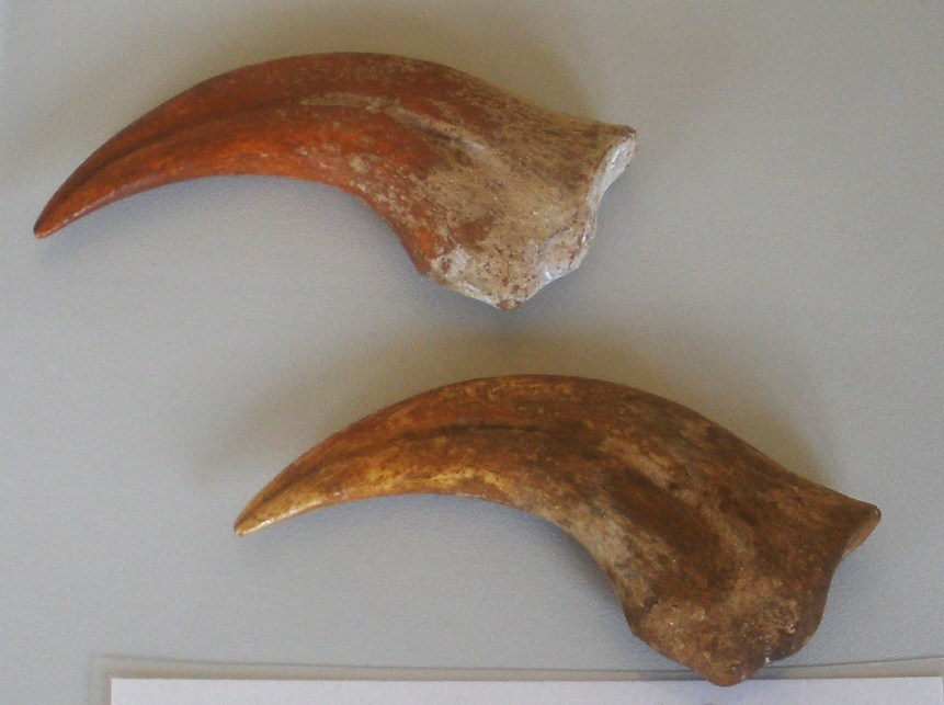 Fossil of Elmisaurus, an extinct theropod- Took the photo at De Groene Poort, Boxtel